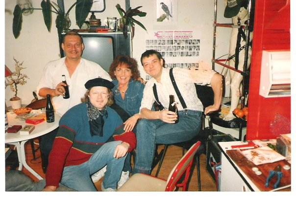 Videomøde i Uno og Birthes hjem!